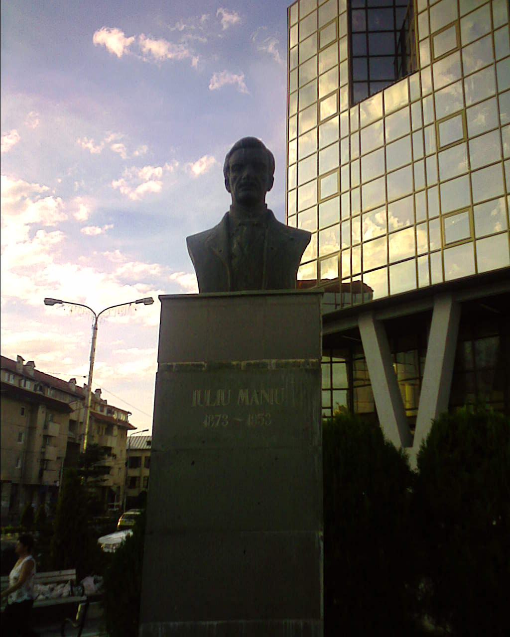 Statuia lui Iuliu Maniu din piaţa Iuliu Maniu din Zalău